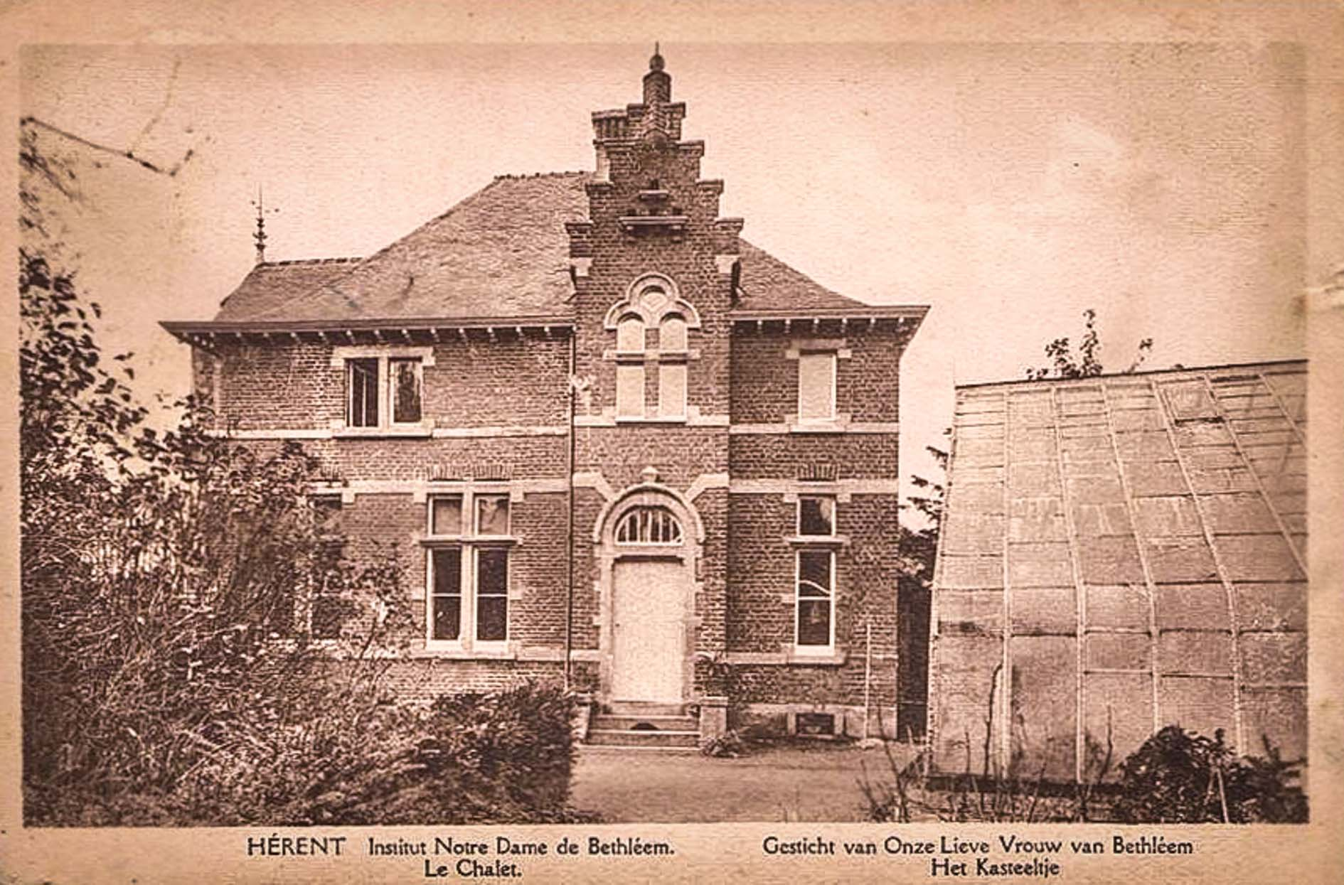 HÉRENT Gesticht van Onze Lieve Vrouw van Bethléem Het Kasteeltje